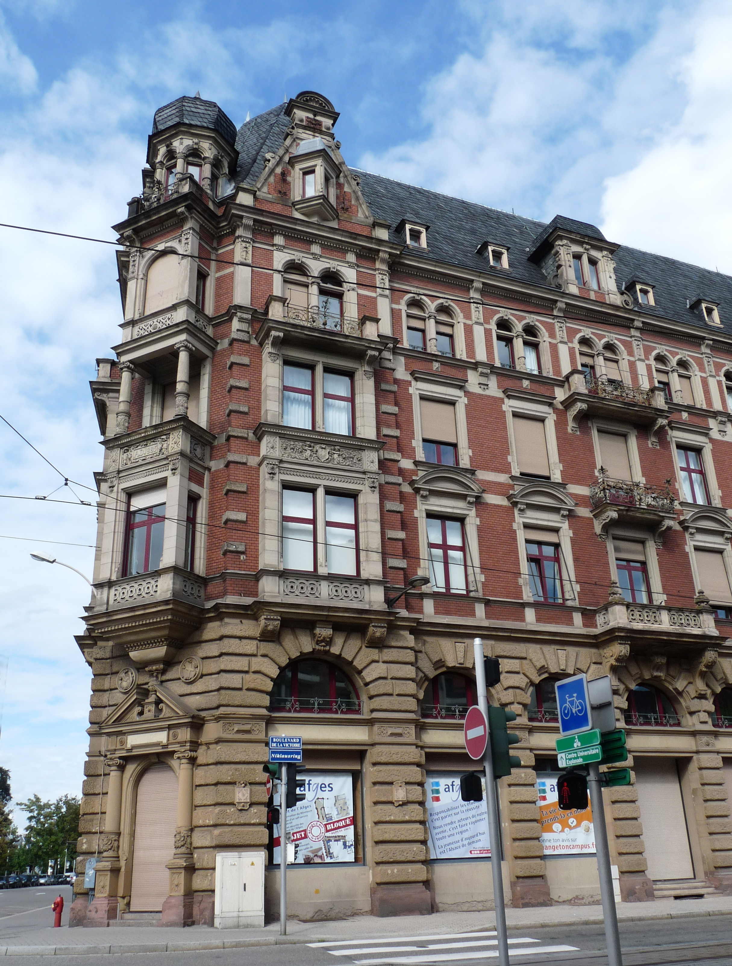 Siège de l'AFGES (Association fédérative générale des étudiants de Strasbourg), dans le bâtiment de la Gallia, boulevard de la Victoire à Strasbourg